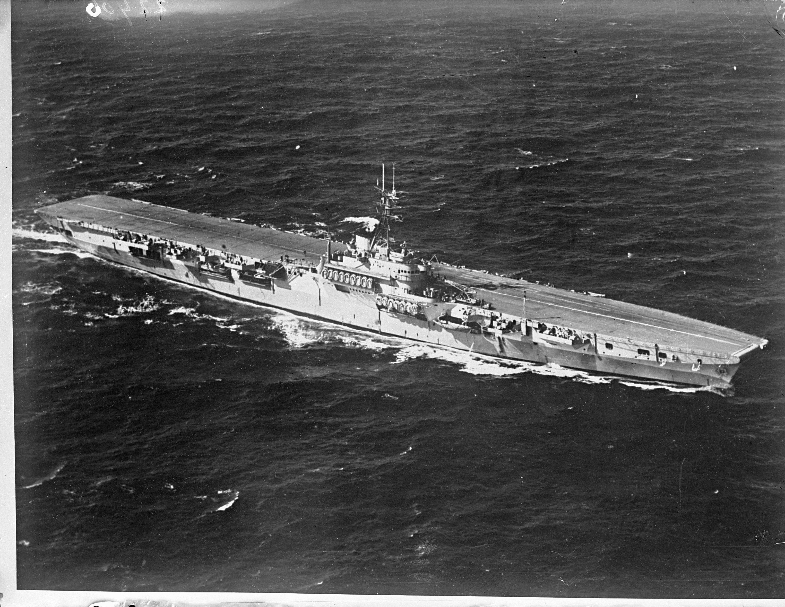 Collectie / Archief : Fotocollectie Anefo Reportage / Serie : [ onbekend ] Beschrijving : Het Britse vliegkampschip HMS 'Venerable', de latere Hr. Ms. 'Karel Doorman' van bakboordzijde Datum : 25 juni 1947 Trefwoorden : marine, schepen Instellingsnaam : HMS Venerable Fotograaf : Fotograaf Onbekend / Anefo Auteursrechthebbende : Nationaal Archief Materiaalsoort : Glasnegatief Nummer archiefinventaris : bekijk toegang 2.24.01.09 Bestanddeelnummer : 902-2406